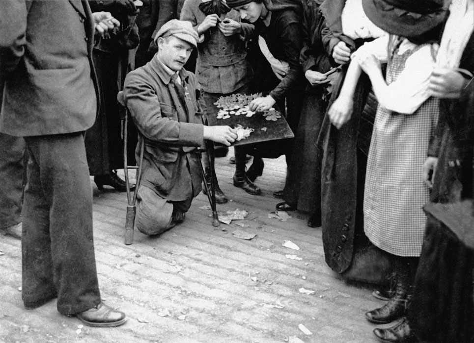 Paris dans la Grande Guerre. 14 juillet 1919, un mutilé de guerre vend des insignes avenue des Champs-Élysées, lors de la fête de la Victoire.